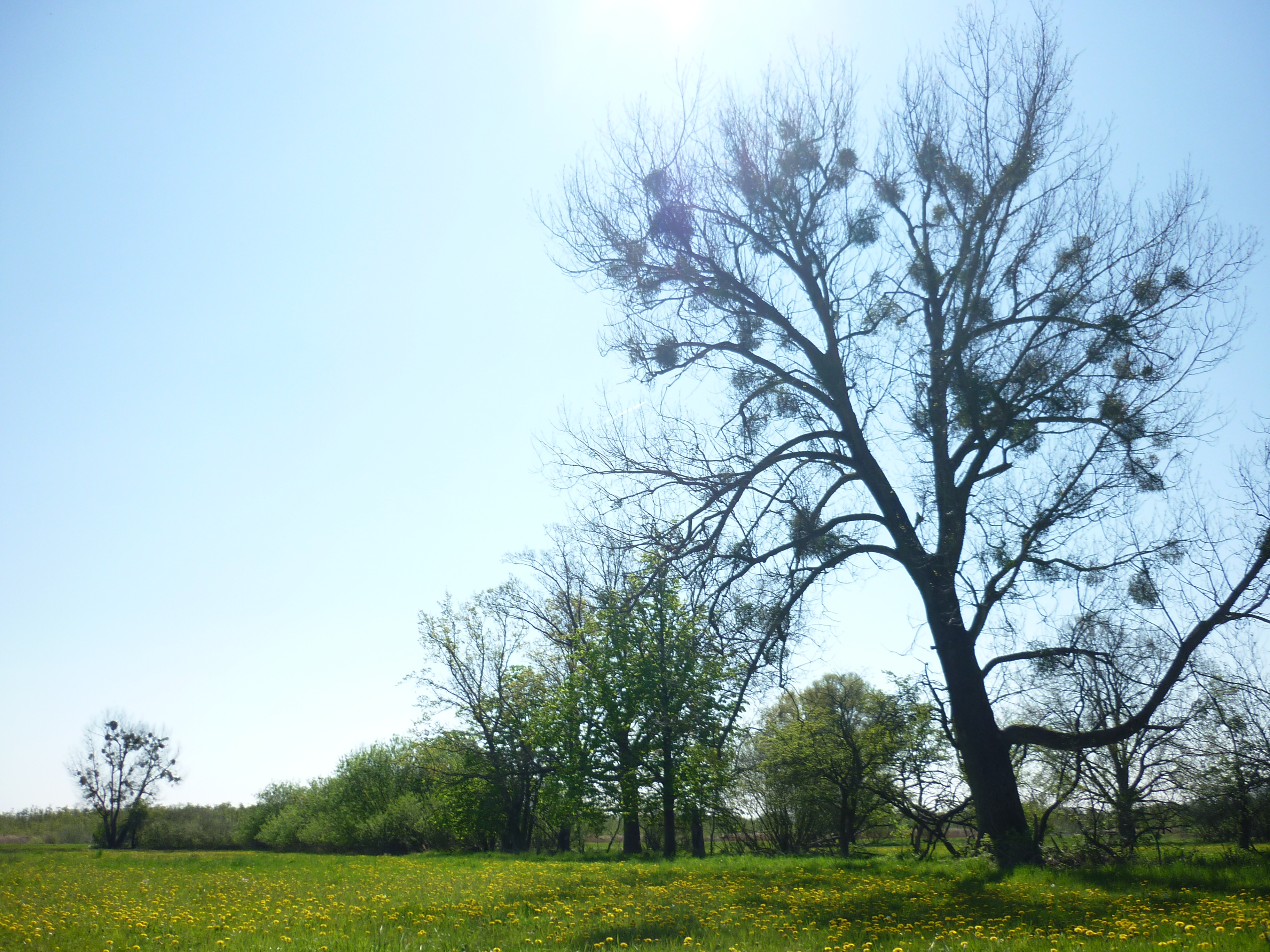 Naturschutzgebiet Klienitz bei Zehdenick (Kreis Oberhavel)